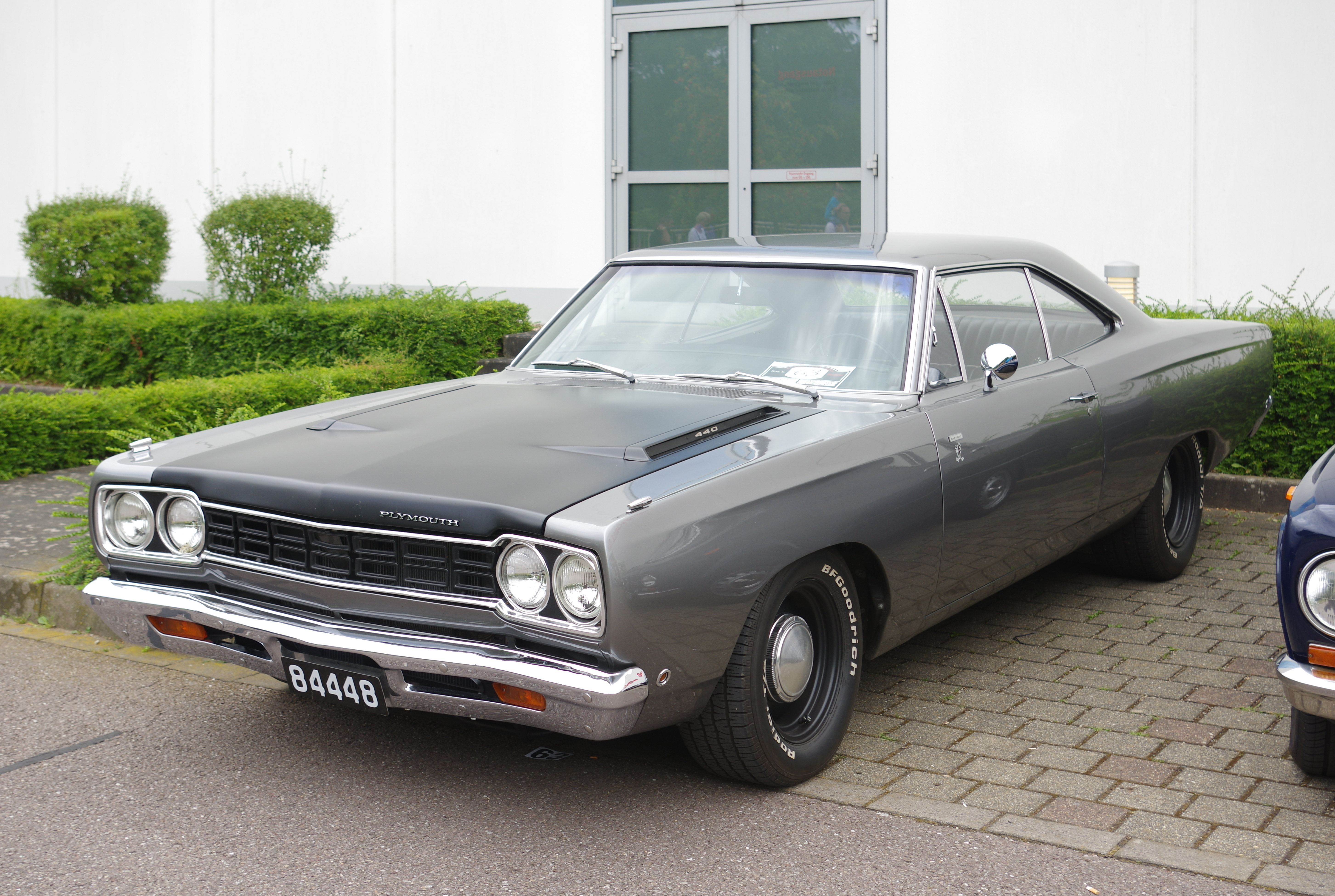 Plymouth Road Runner, 1968, 400 PS 32. Internationales Oldtimer Treffen Konz 2016, Das Nummernschild ist verfälscht!